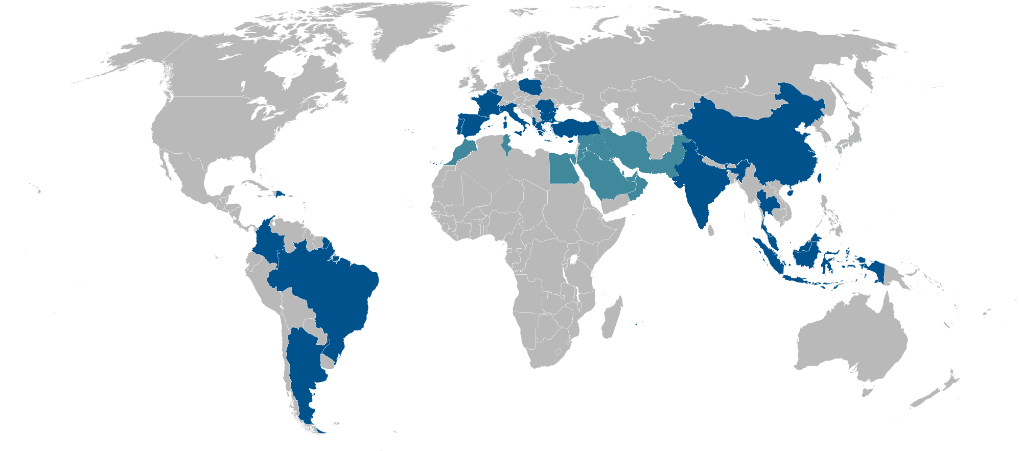 presencia mundial 2012